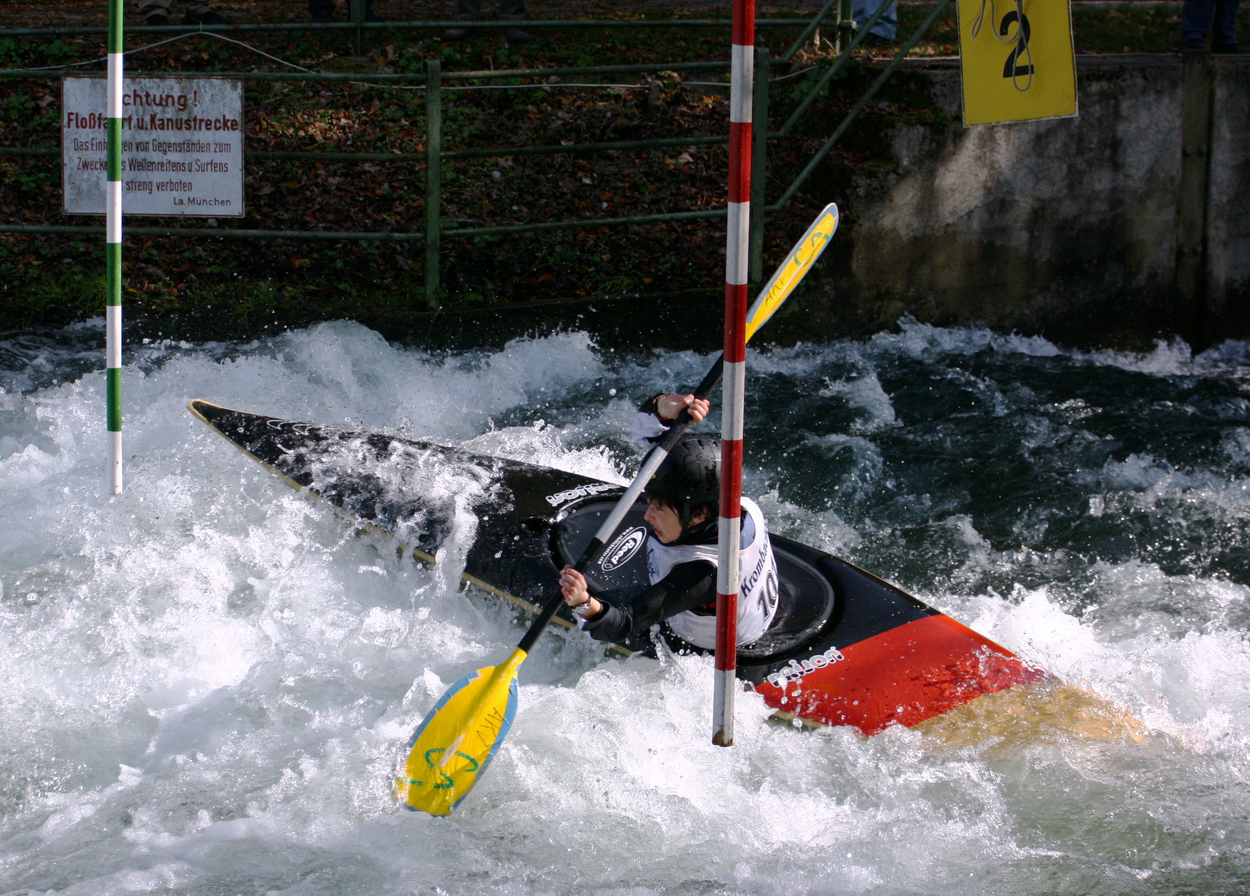 Kjakfahrer auf der Isar bei der Süddeutschen Meisterschaft.